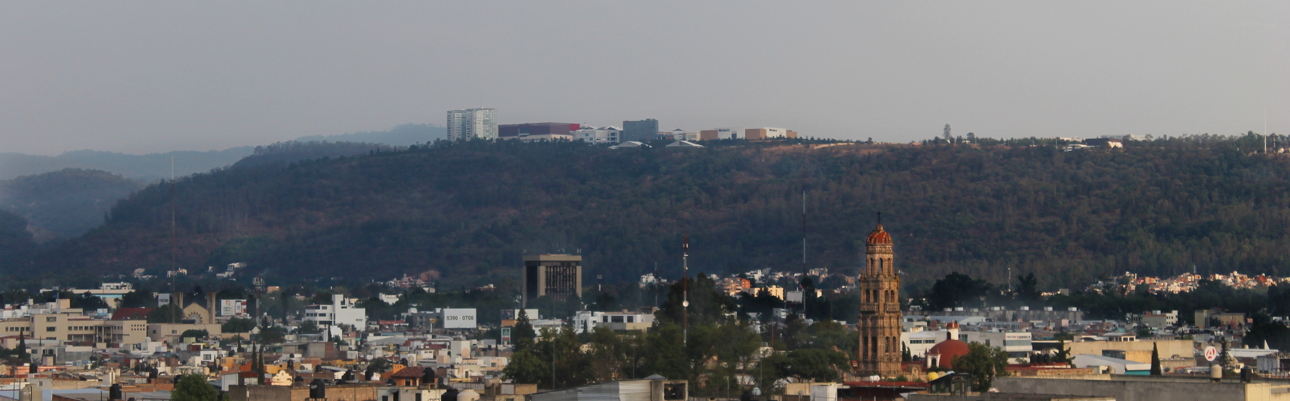 Panorámica de la zona sur de Morelia desde el centro histórico